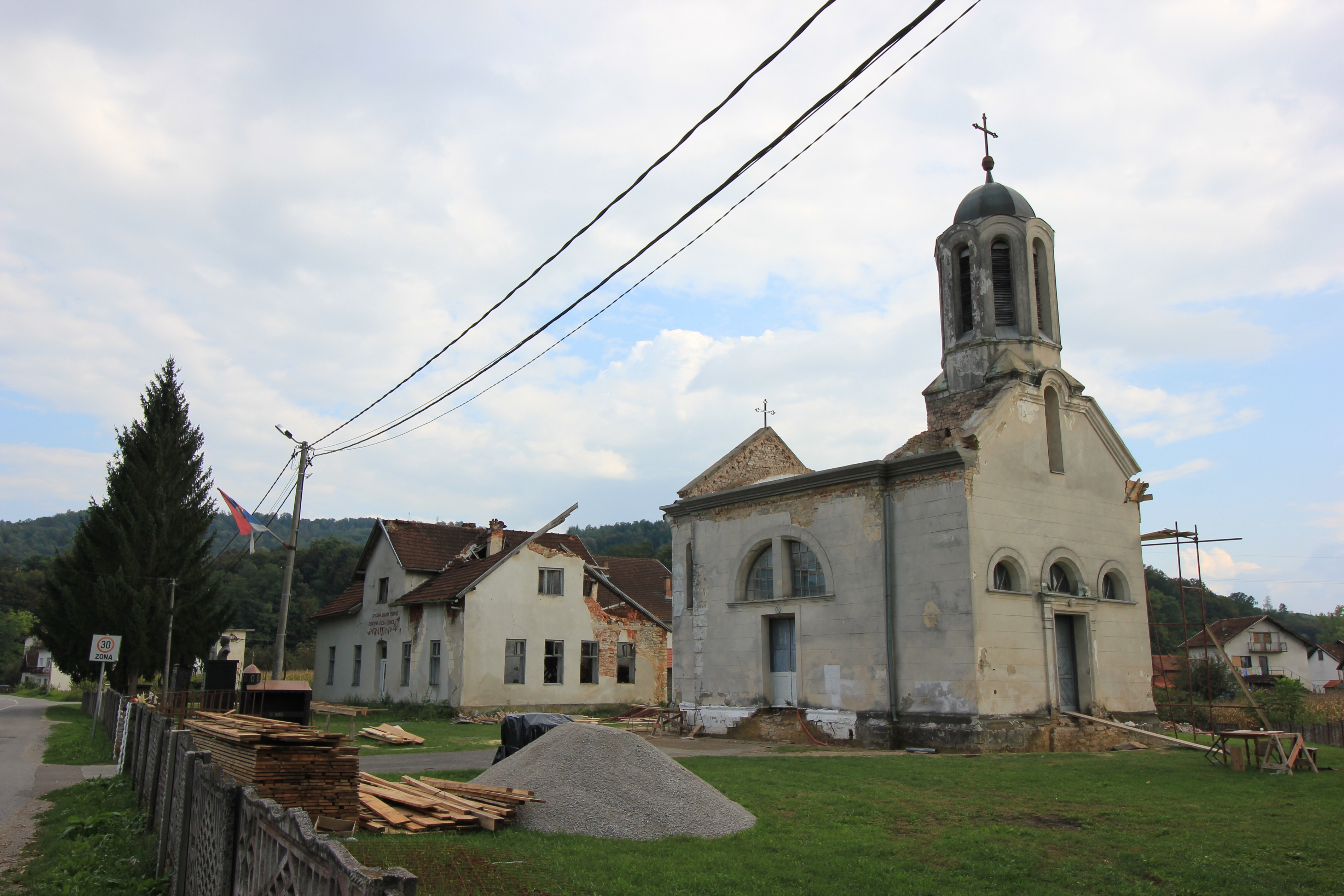 Ruine der serbisch-orthodoxen Kirche sowie der Schule in Rudice, Gemeinde Novi Grad (Bosanski Novi), Bosnien.